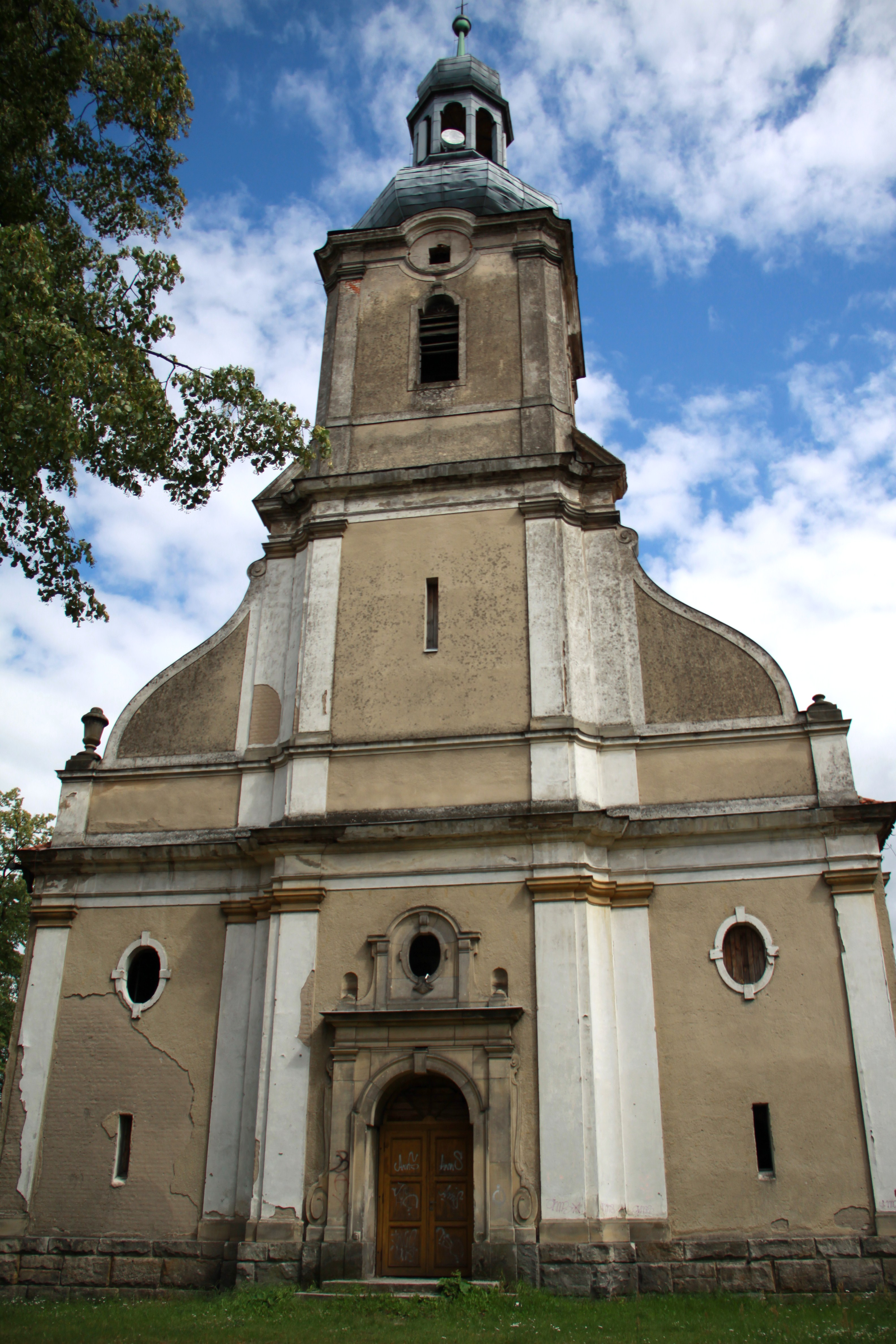 Obrzycko, kościół ewangelicki, 1909-1911